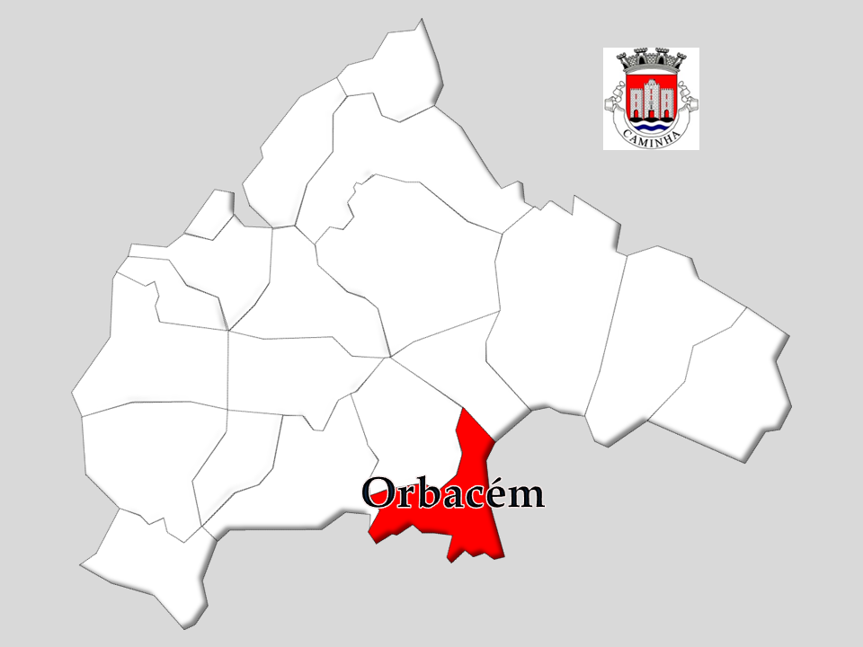 Censos 1864/2011